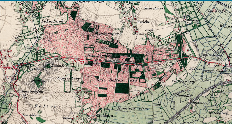 Oude topografische kaart van de Herikerberg. Ongeveer in 1890 gemaakt. In rood kale of landbouwgrond, in groen bebossing. Schaal: 1:16.181